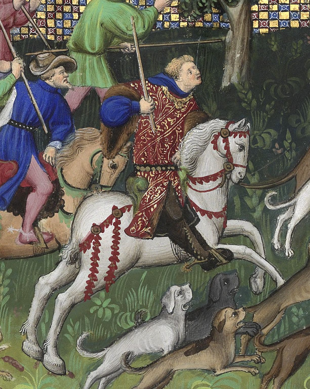 La chasse au lièvre, page 89 v du Livre de la chasse.